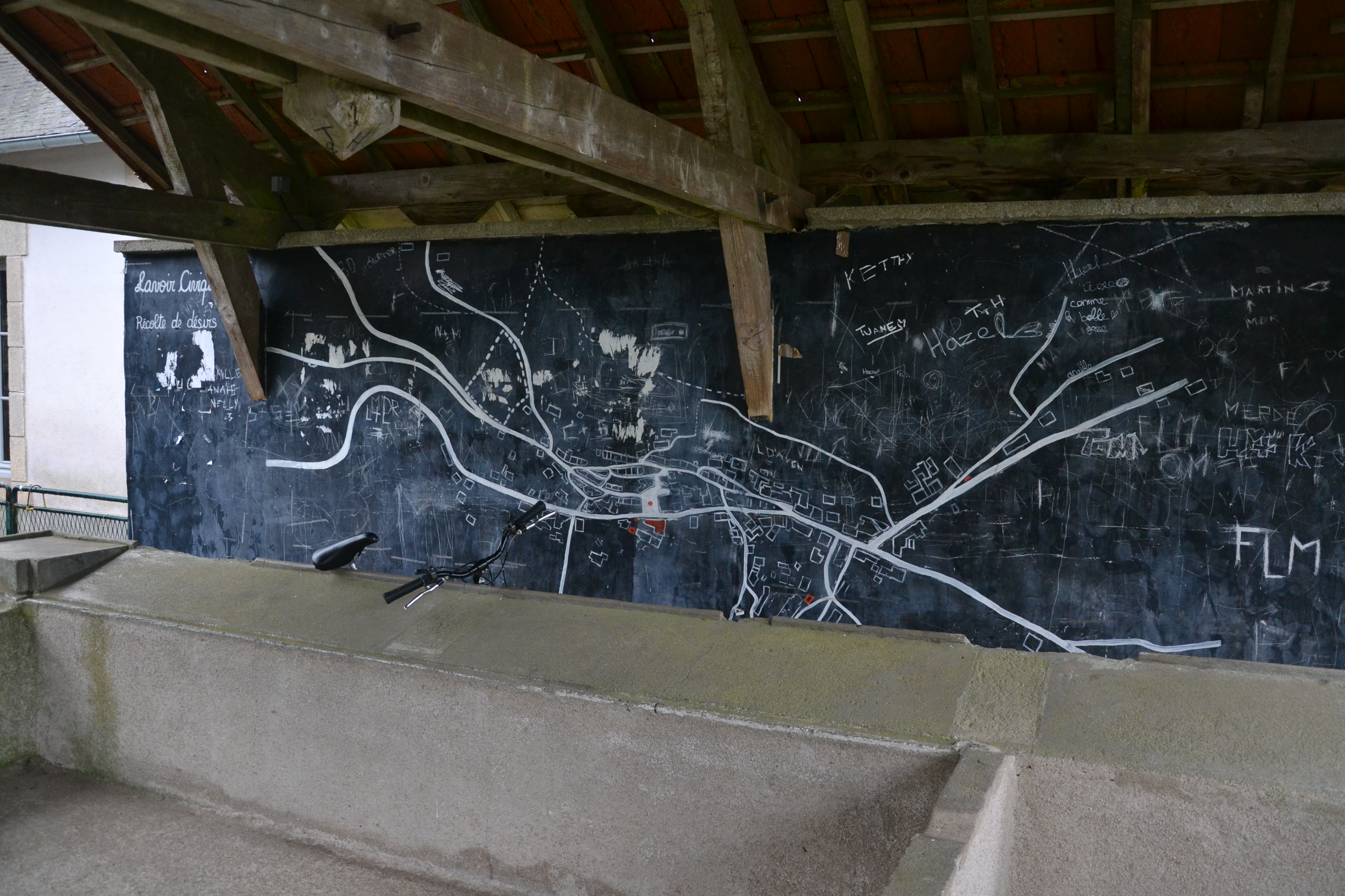 Le lavoir de Faux-la-Montagne (Creuse, France).